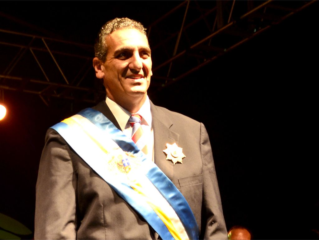 Juramentación - Diciembre 2013